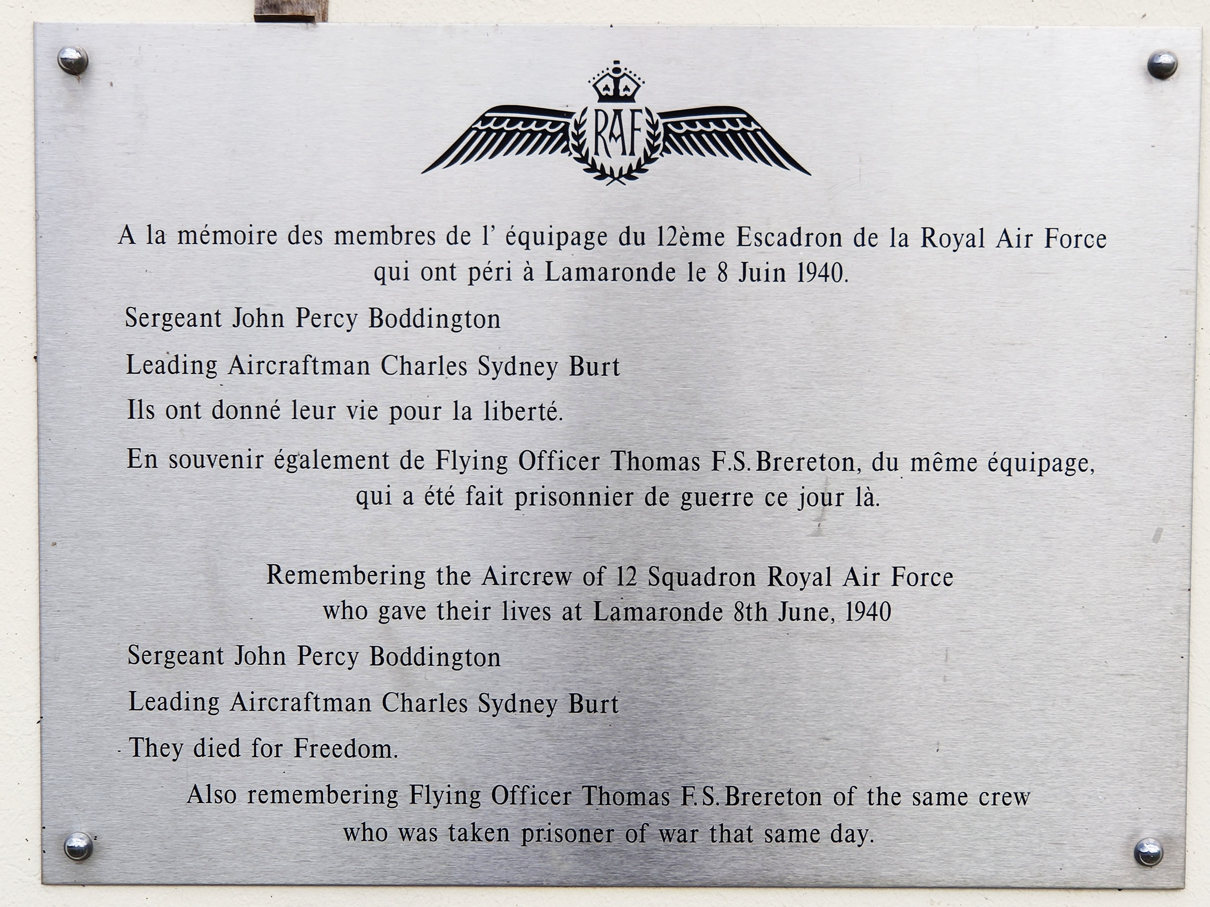 Lamaronde : Plaque commémorative édifiée sur le côté de l'église honorant les aviateurs du 12e escadron de la RAF tués ou faits prisonniers le 8 juin 1940